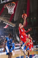 Gianmarco Pozzecco. Immagine rilasciata dal proprietario della stessa, pallacanestro Varese